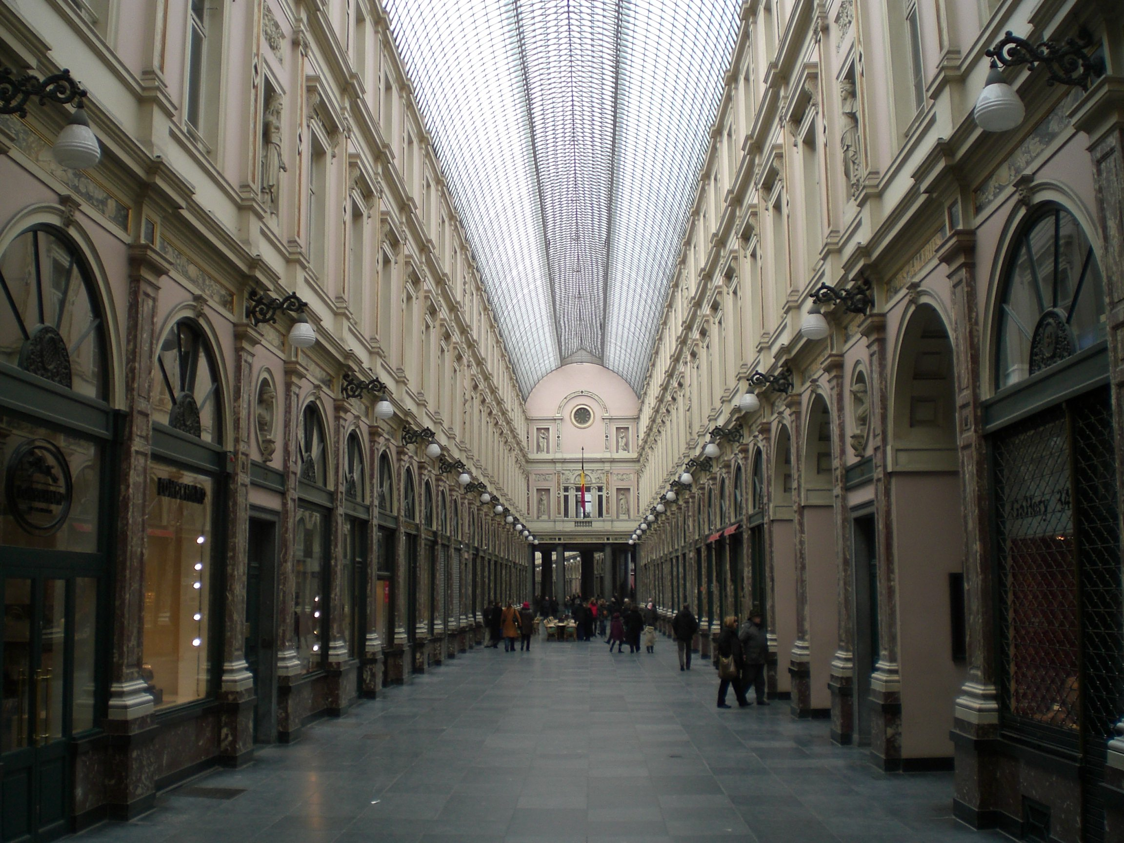 Galerie dans Bruxelles.